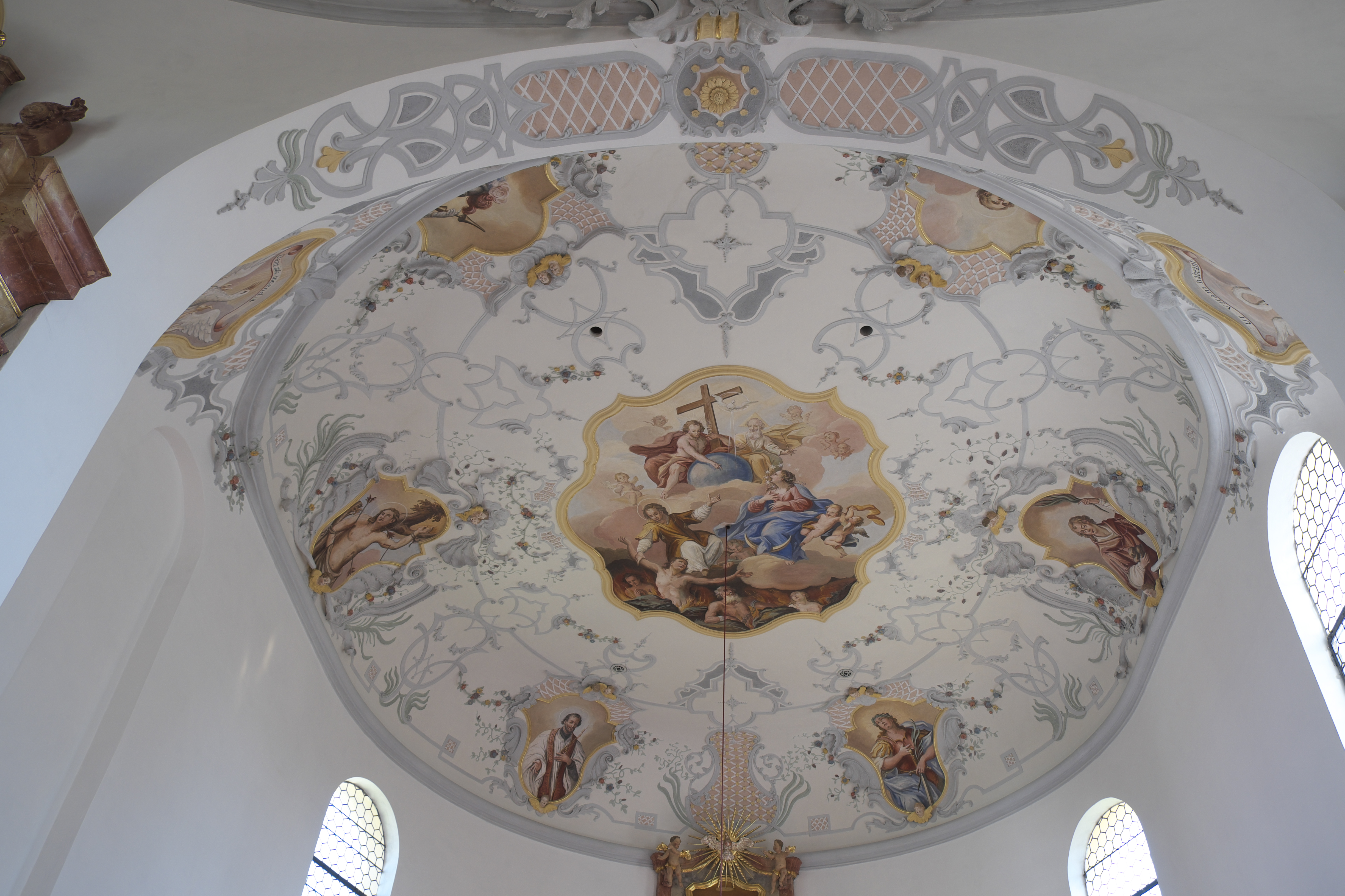 Katholische Pfarrkirche St. Laurentius in Reinhartshausen (Bobingen) im schwäbischen Landkreis Augsburg (Bayern/Deutschland), Stuckdekor nach Entwurf von Franz Xaver Feuchtmayer dem Älteren, von 1742; Fresken von Johann Georg Leederer, von 1742